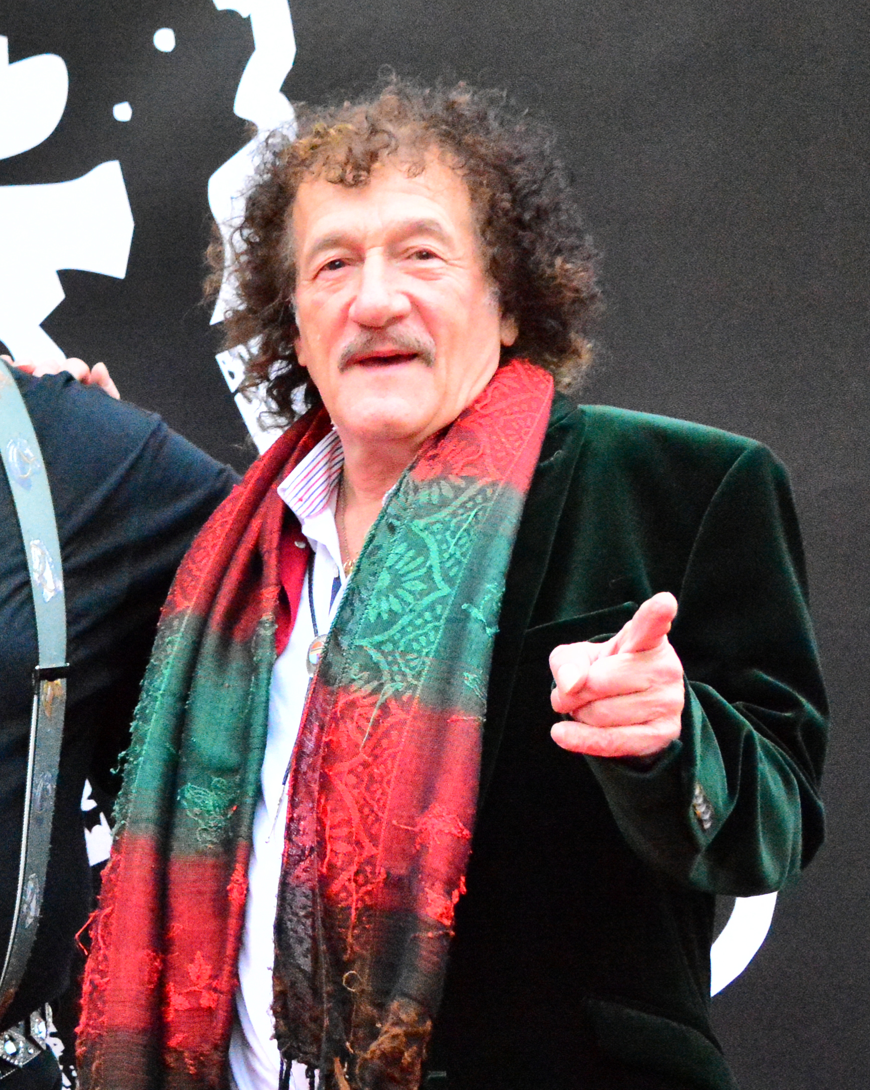 Geff Harrison beim Contry Special 2015 in Hamburg